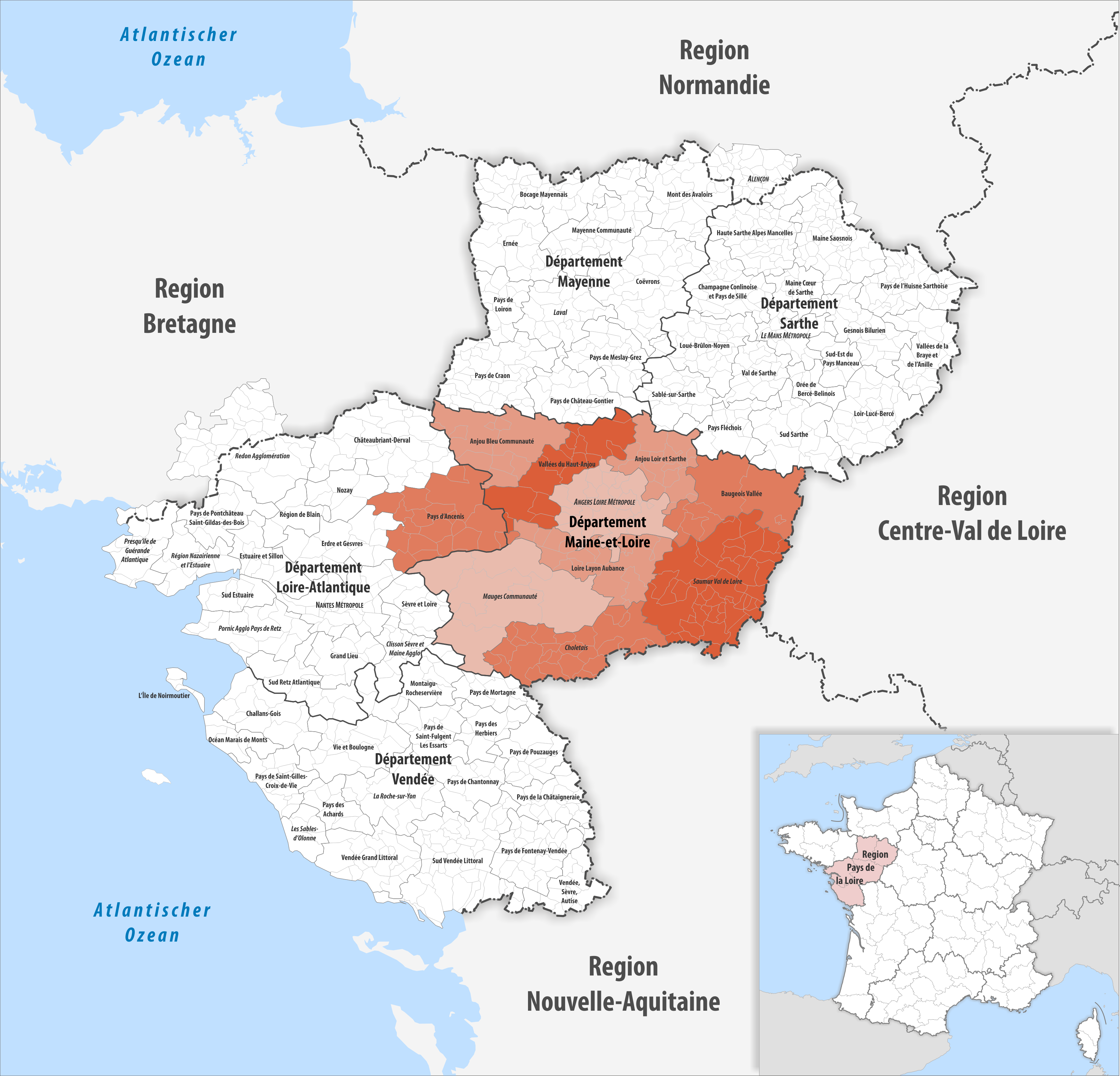 Gemeindeverbände im Département Maine-et-Loire